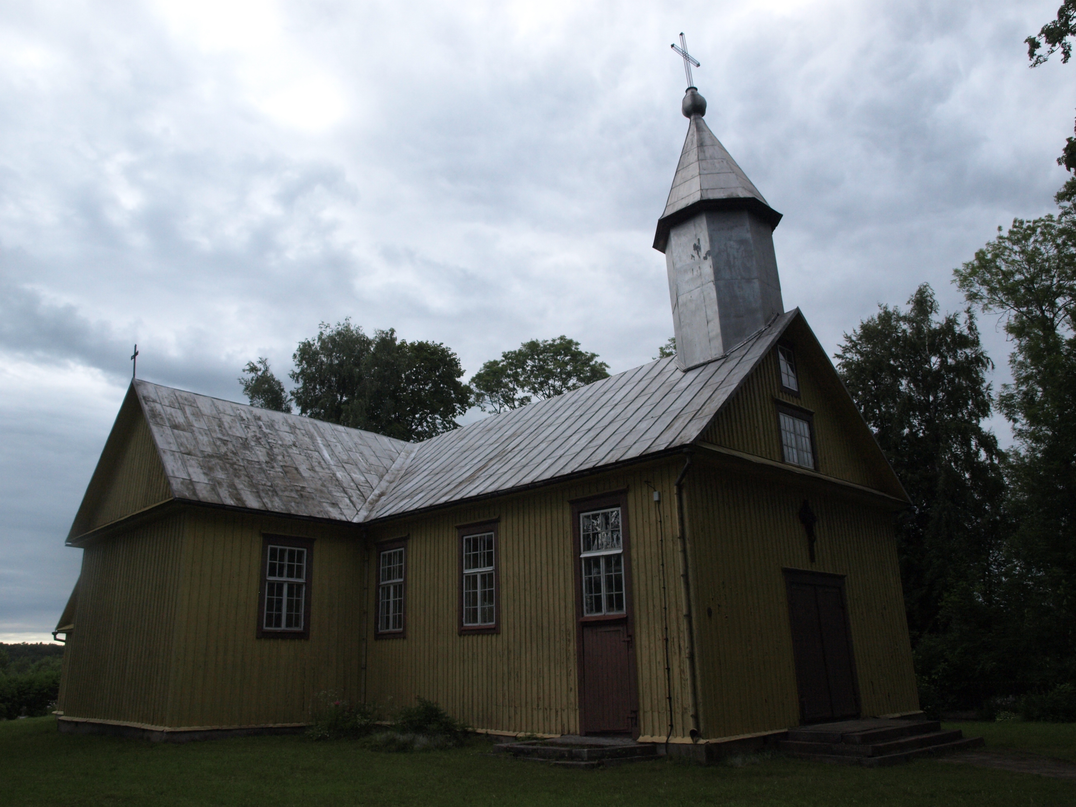 Duokiškis church